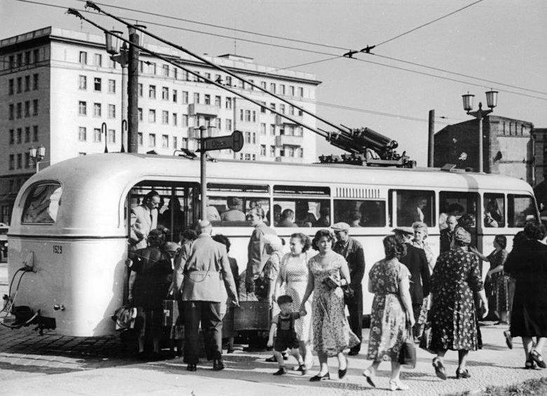 Berlin, Fruchtstrasse, Trolleybus Zentralbild Krueger Quasch. 4 Motive 7.8.1954 Großstadt - Berlin (August 1954) UBz: Obus an der Haltestelle Fruchtstrasse, Ecke Karl-Marx-Allee.